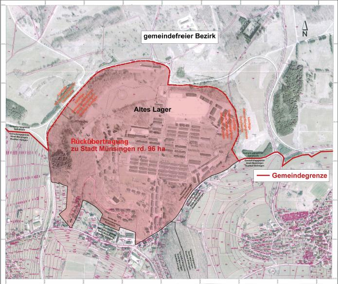 Flächen (Altes Lager, Am Kapf und Königstraße) der Rückübertragung vom Gutsbezirk Münsingen an die Stadt Münsingen.